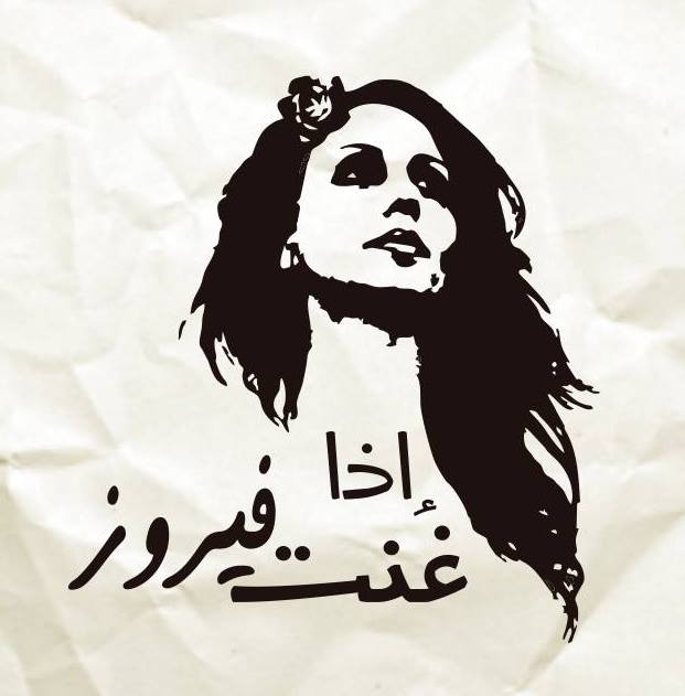 إذا غنت فيروز